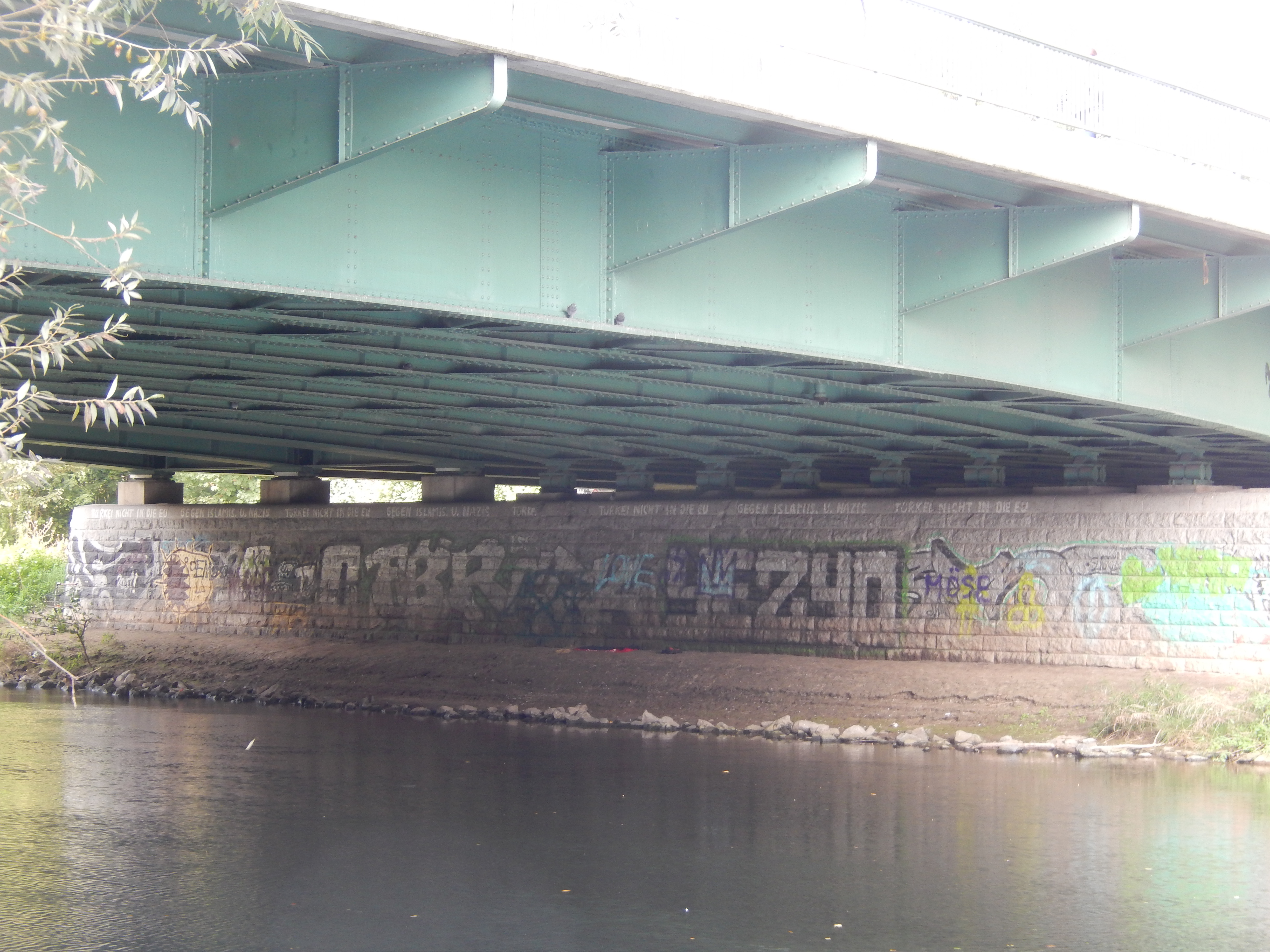 Die Legionsbrücke in Hannover führt die Lavesallee über die Ihme